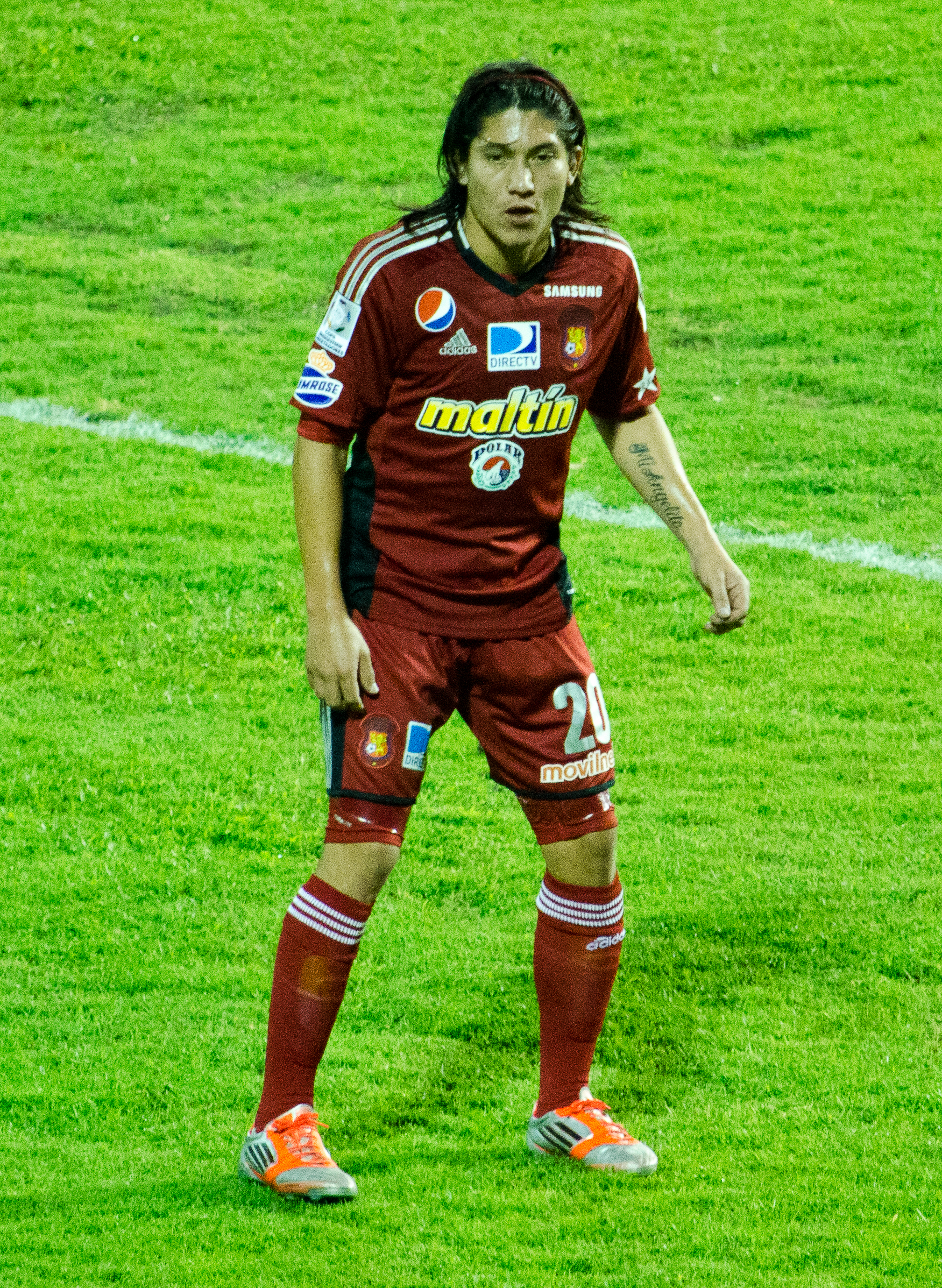 Anyul Rivas